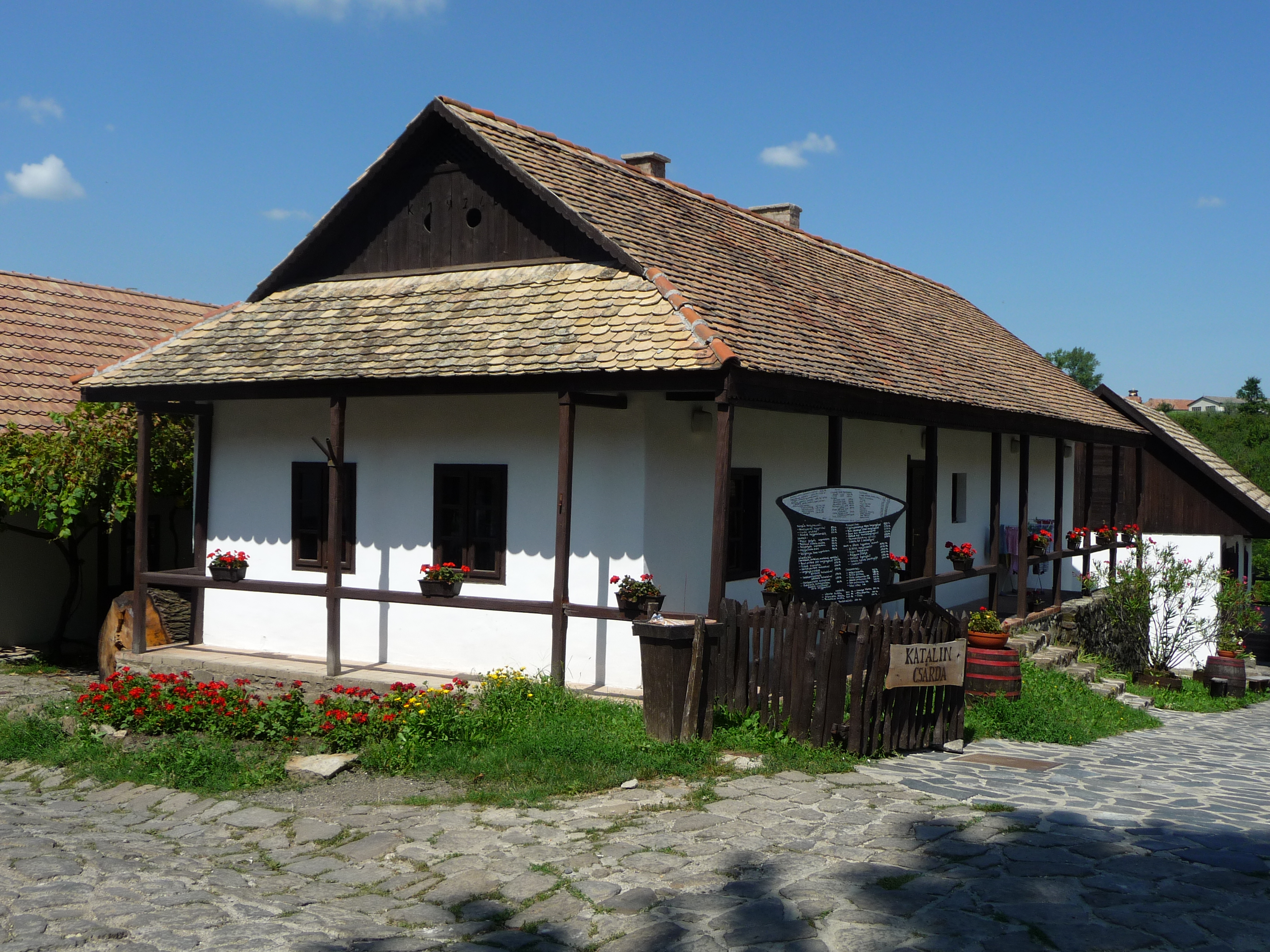 Hollókő, Kossuth L. út 69.